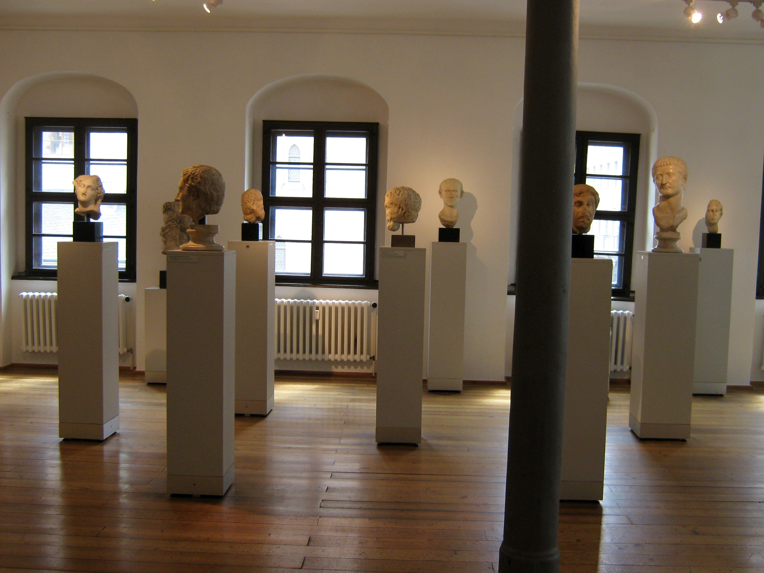 Blick in das Antikenmuseums der Universität Leipzig